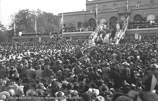 17 mai 1942 Photographie des célébrations du tricentenaire de la fondation de la ville de Montréal. On y voit la foule rassemblée au parc Jeanne-Mance lors de l'hommage au Très Saint-Sacrement, de même que le Central d'alarme des pompiers (devenu quartier général du Service de la sécurité incendie de Montréal). Photographe Edgar Gariépy